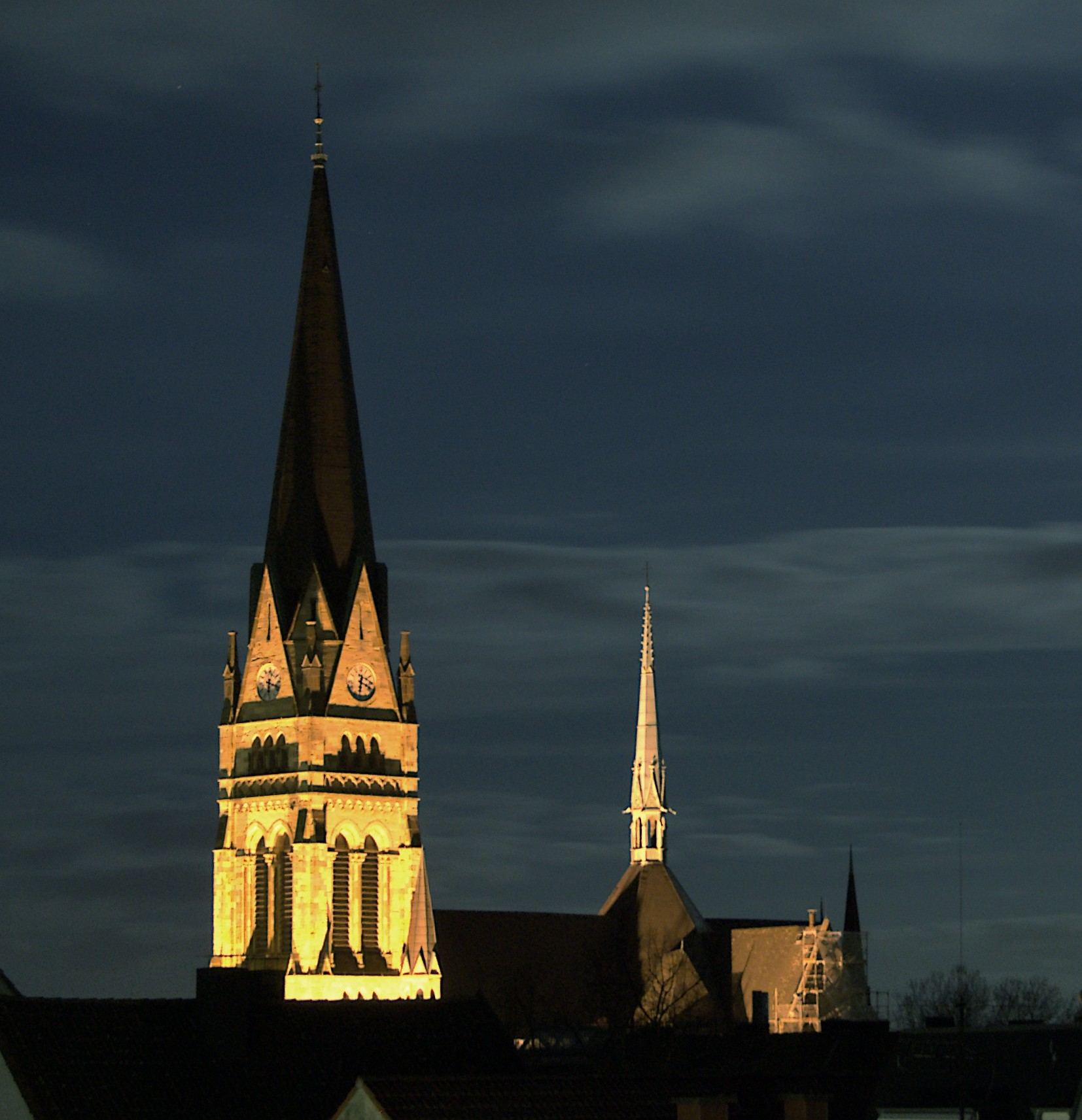 Heilig-Kreuz-Kirche. Location: Münster, NRW, Germany